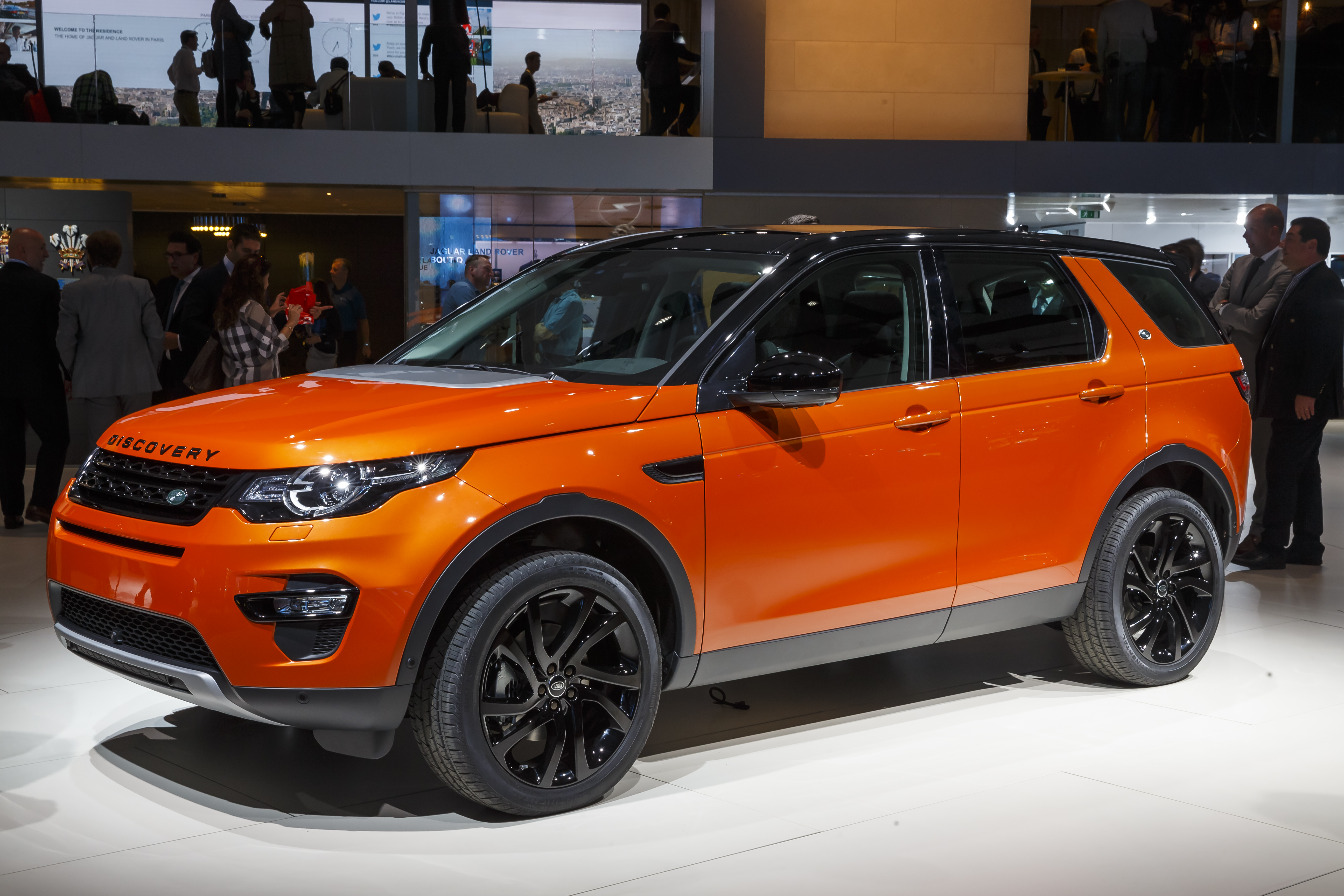 Jaguar Land Rover press conference the 2014 Paris Motor Show. Reinforcing its commitment to product development and global expansion, Jaguar Land Rover, the UK's leading manufacturer of premium vehicles showcased its breakthrough Land Rover Discovery Sport and Jaguar XE models at the Paris Auto Show.